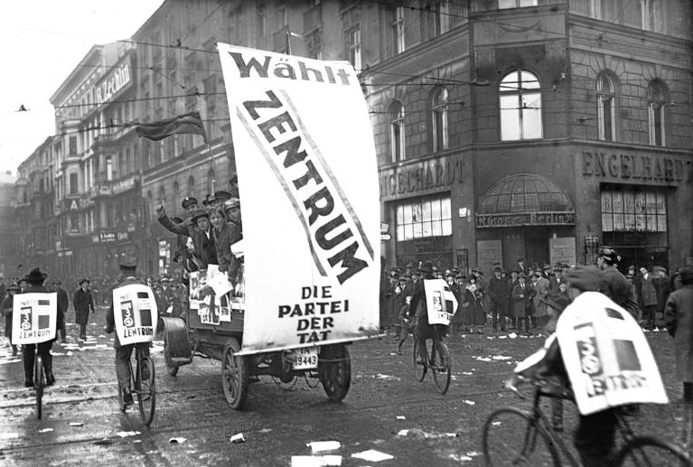 Der Wahlauftakt für die kommende grosse Reichstags-Wahl am 14. September! Ein Propagandawagen des Zentrums in den Strassen Berlins.